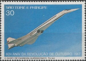 Марка Ту-144. Сан-Томе и Принсипи. 1978 год.